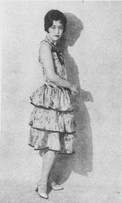 牛山春子（初代メイ牛山）ハリウッド化粧品共同創業者